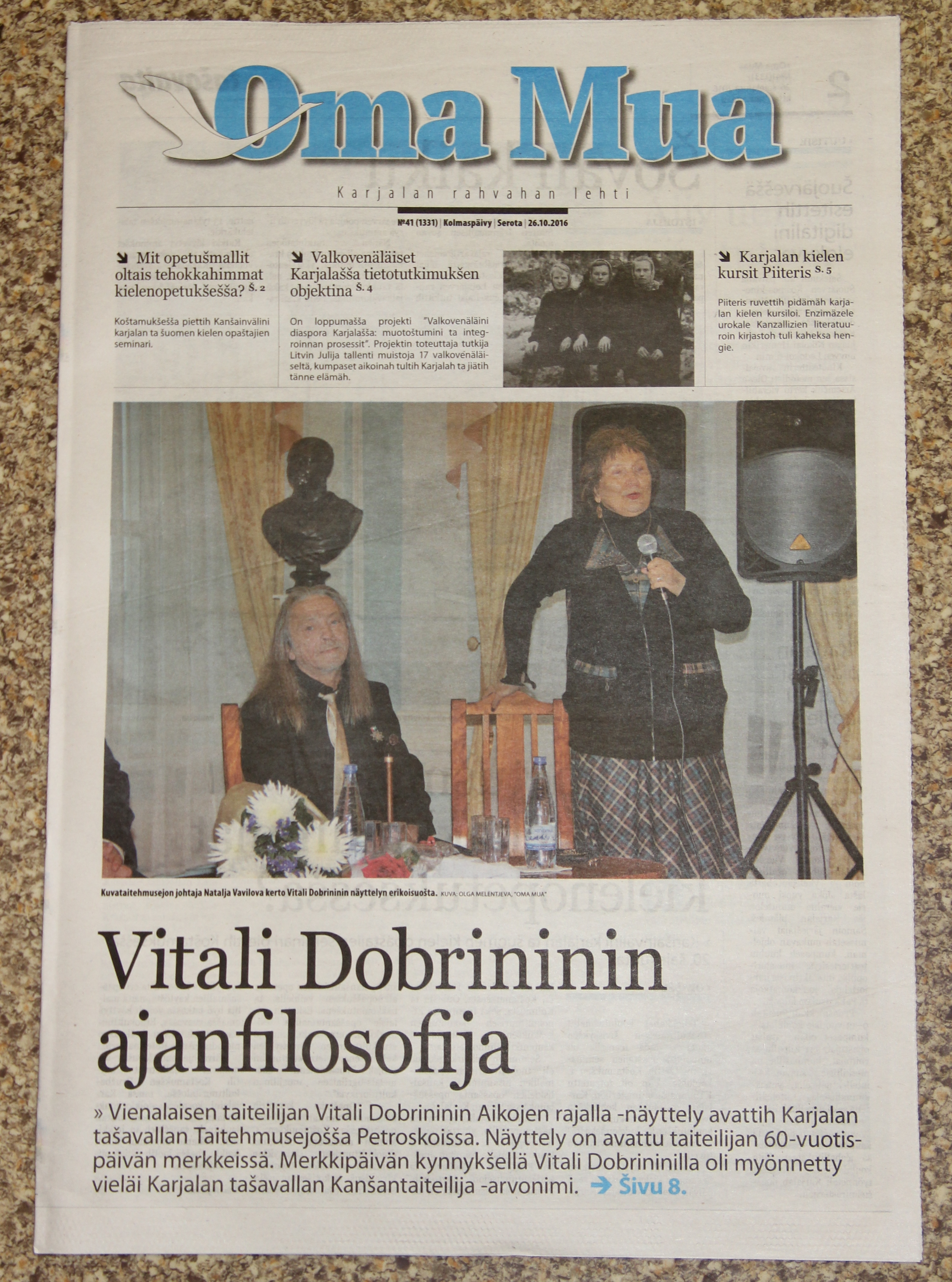 Oma Mua -lehten o 41 (26.10.2016)